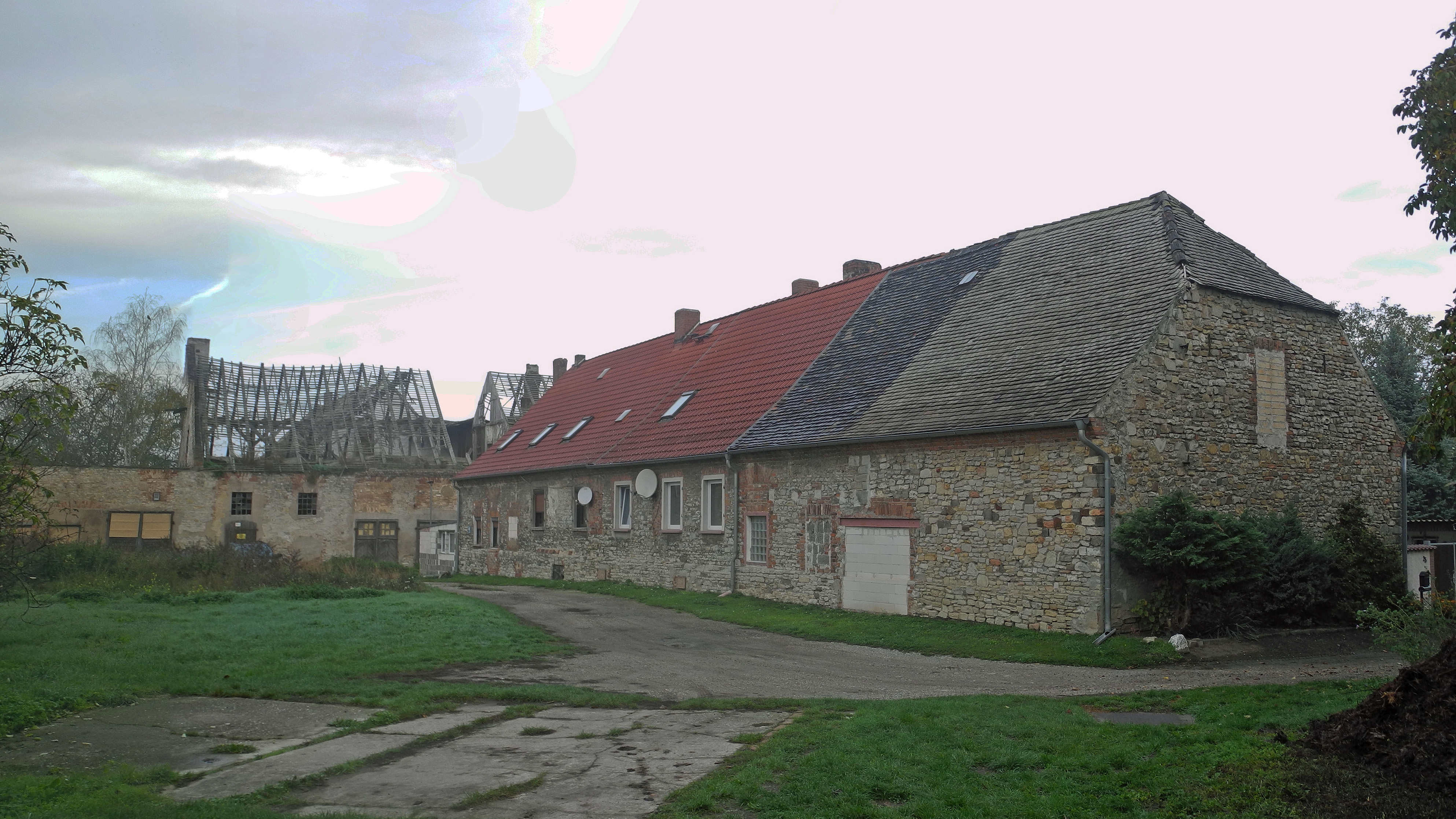 Gehöfte in Gottesgnaden, OT von Calbe (Saale), Nr. 20 bis 34